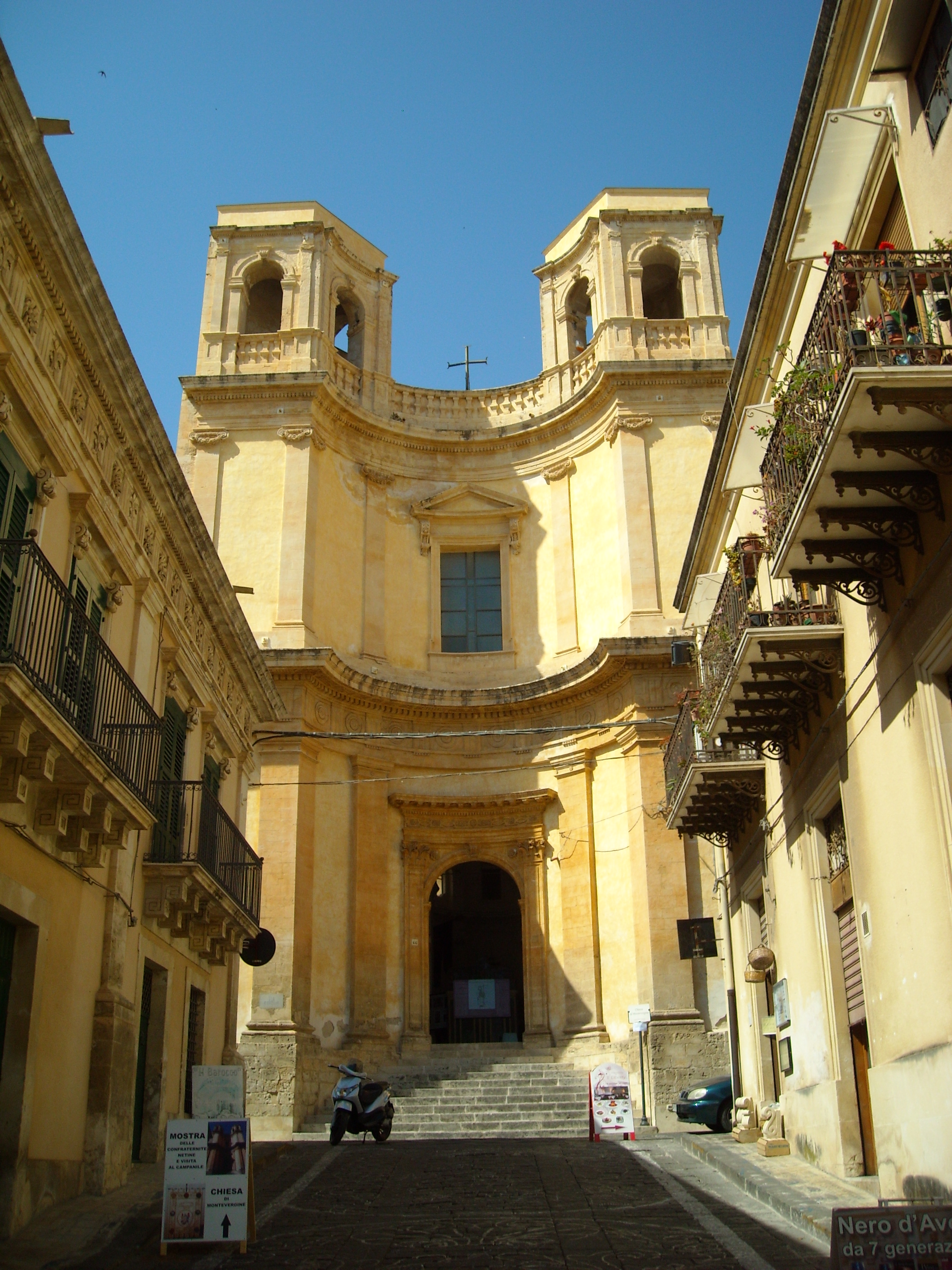 Chiesa di Montevergine, Noto, Sizilien